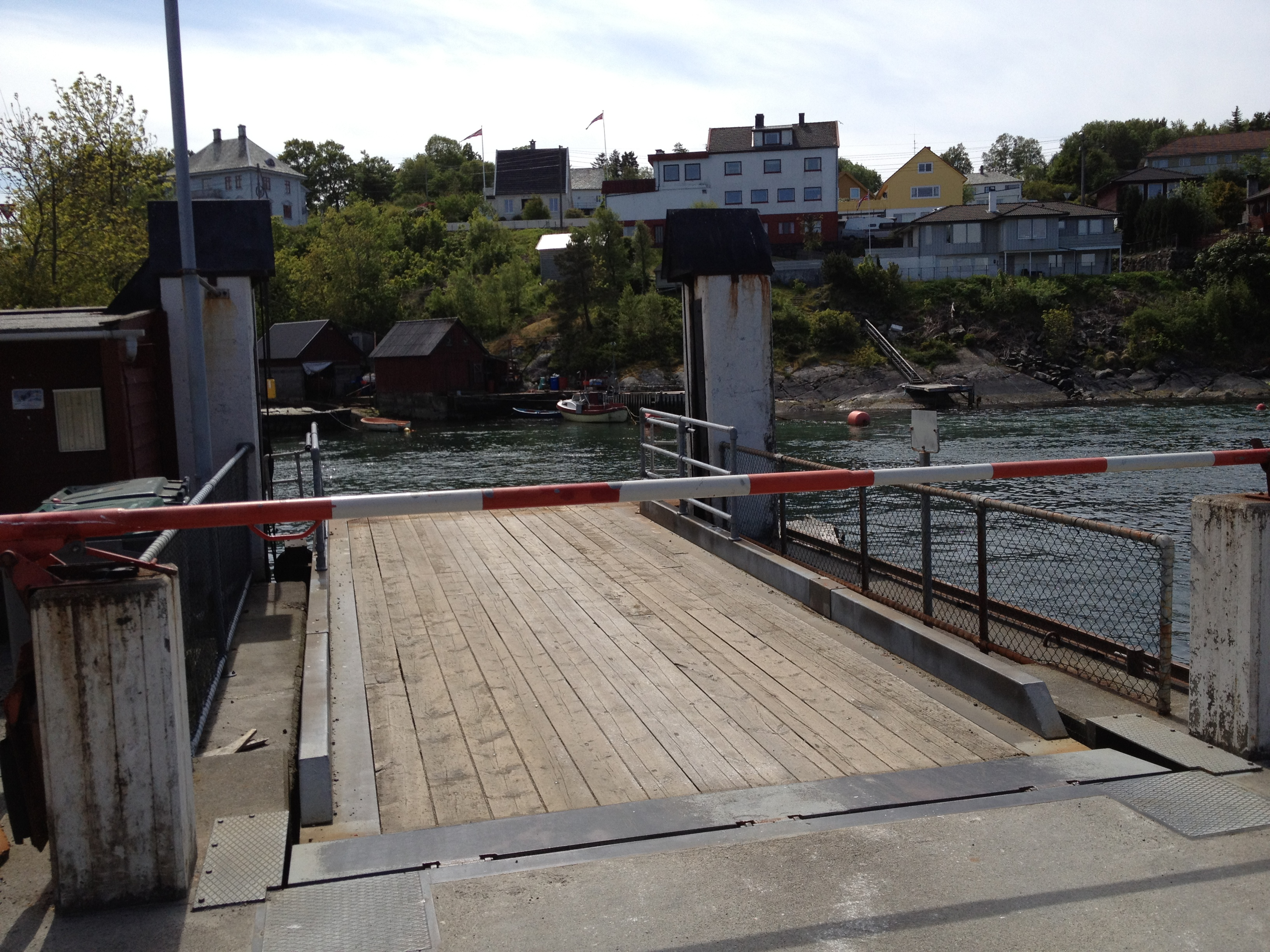 Klokkarvik ferjekai